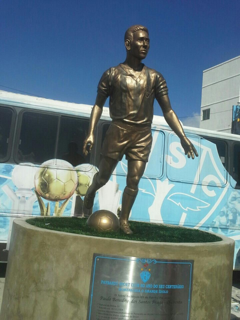 Um dos artilheiros do paysandu